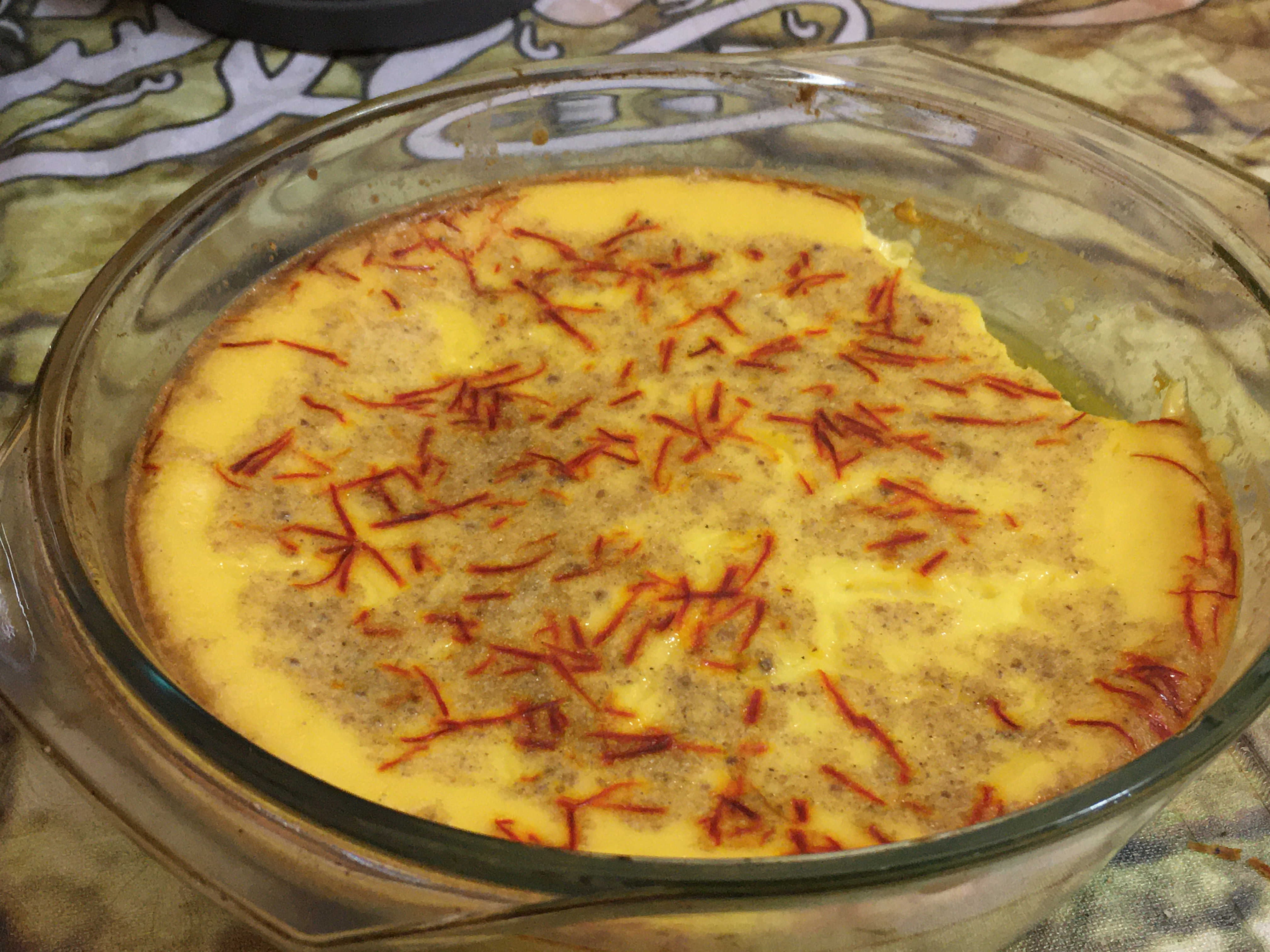 حلوى الألبة من تصويري الخاص